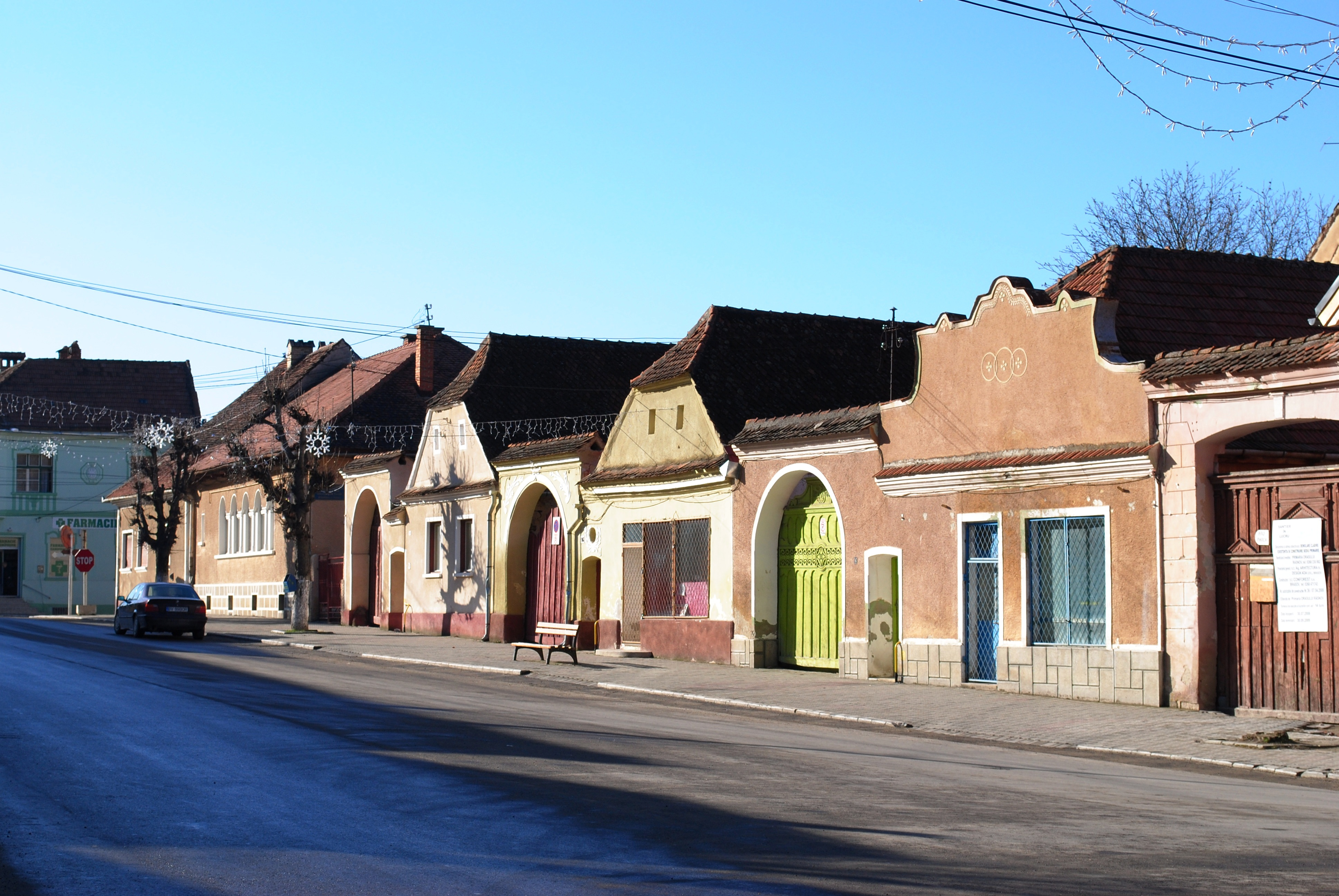 Ansamblul " Piața Unirii" sec. XVIII - XIX